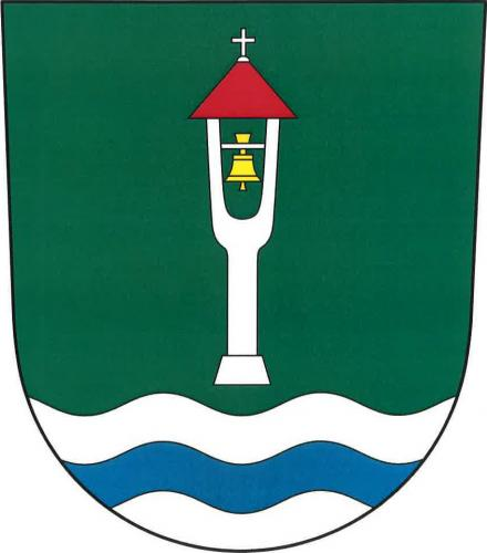 Nové Město (okres Hradec Králové), znak obce